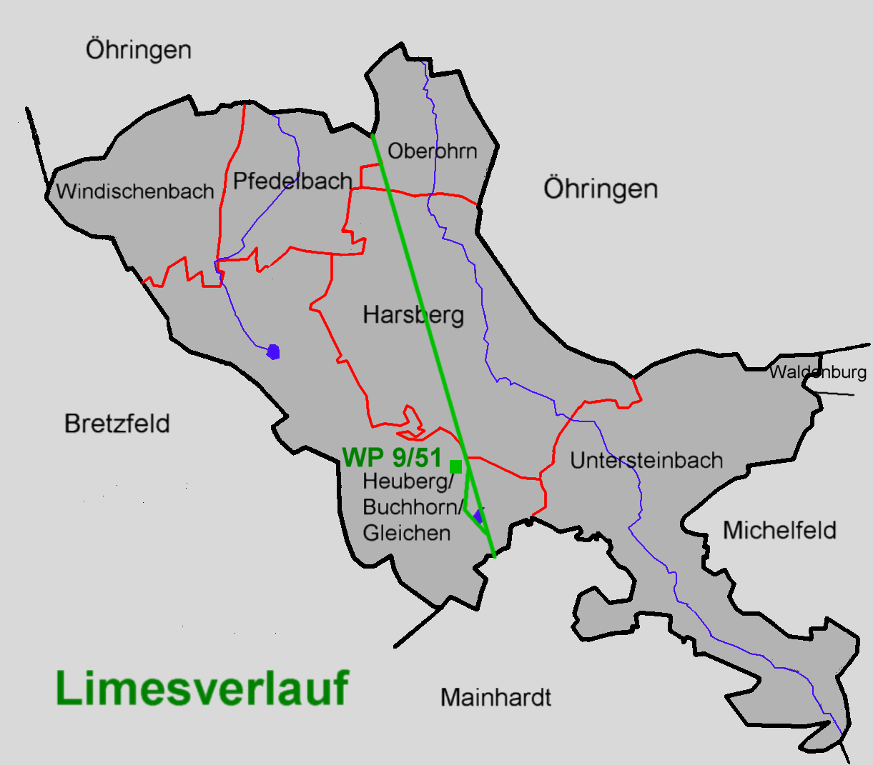 Der Verlauf des Limes in Pfedelbach